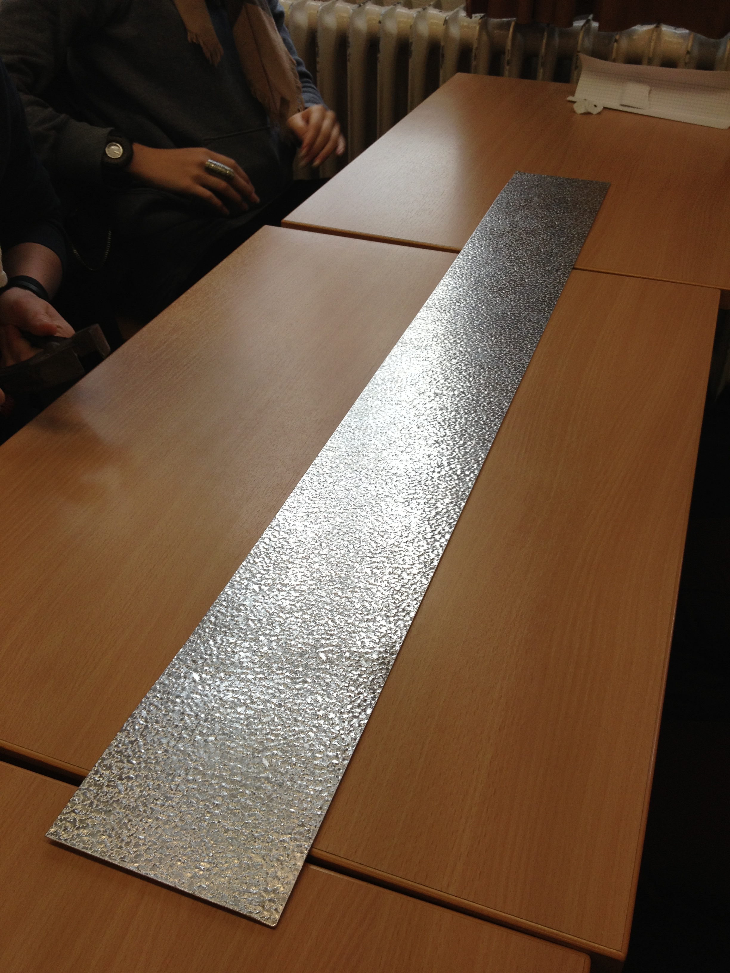 Aluminiumblech